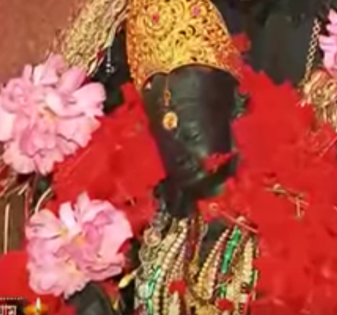 নতুন মূর্তি